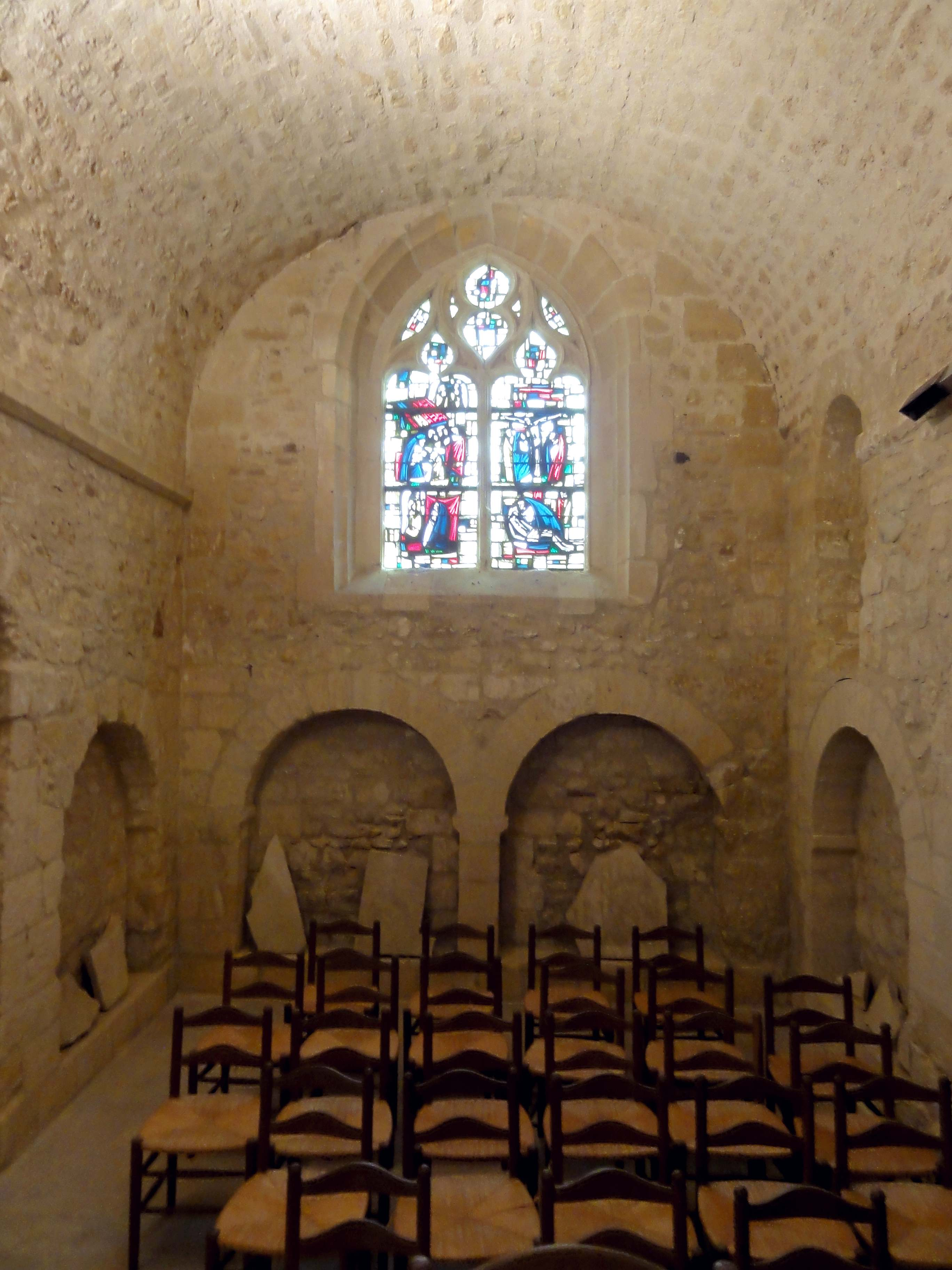 Intérieur de l'église - voir titre.